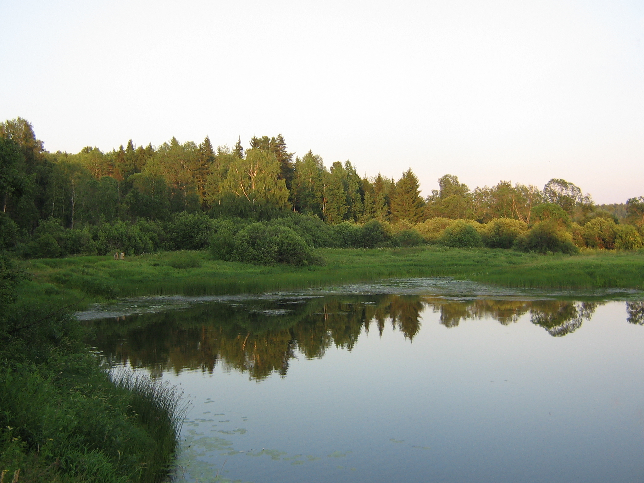 Тебза река